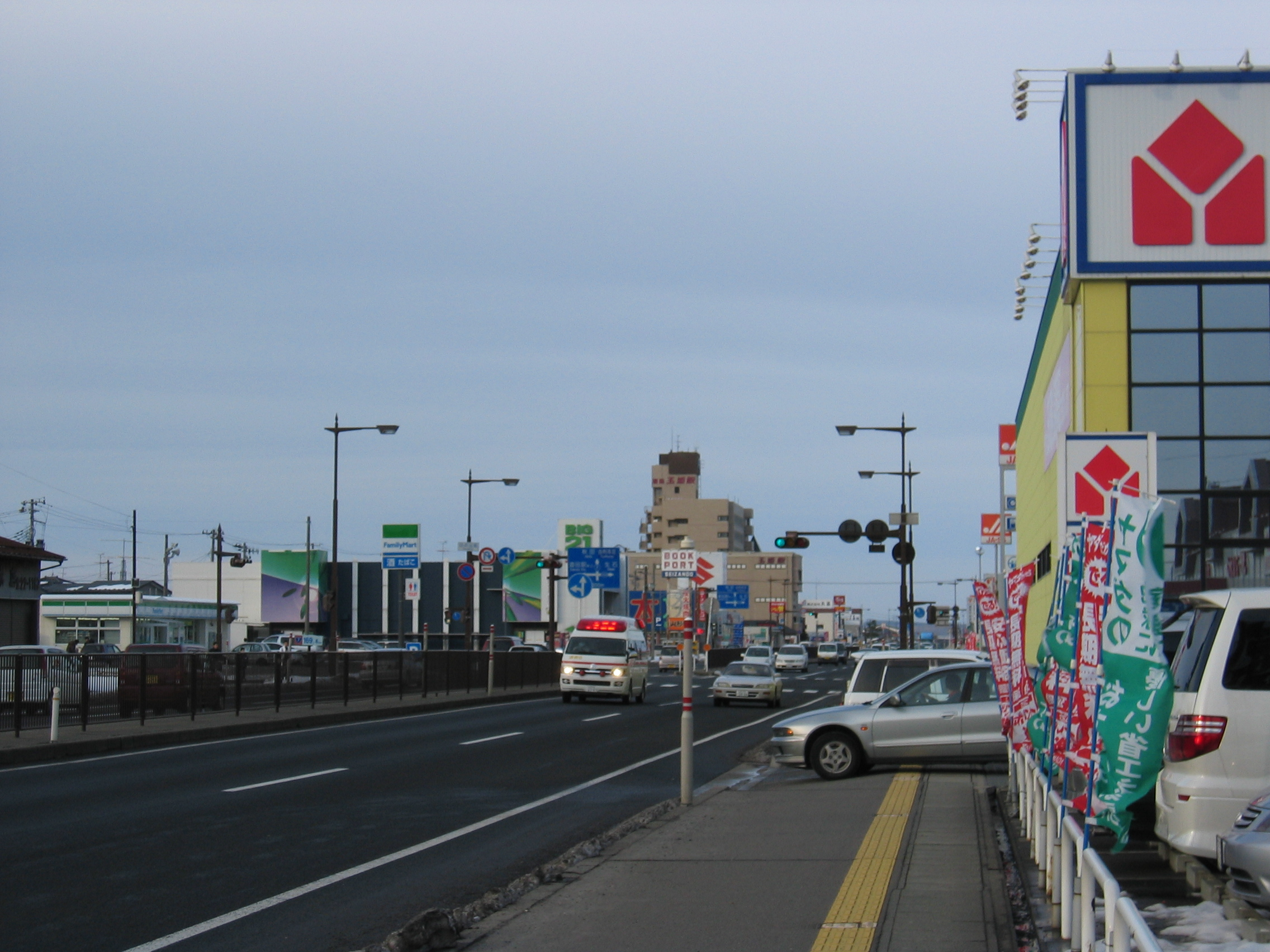 国道7号線酒田市日の出町付近